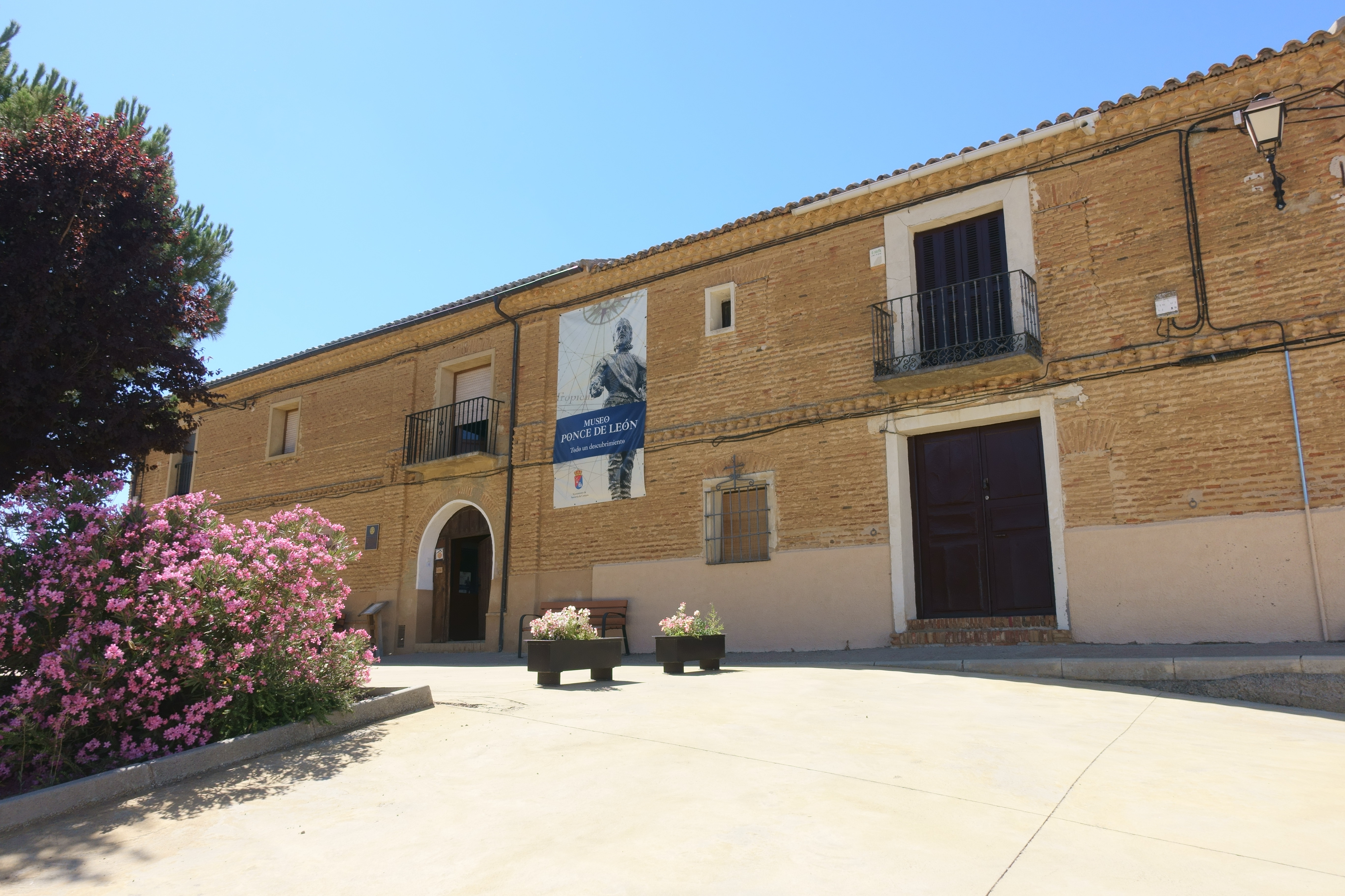 Museo Ponce de León en Santervás de Campos (Valladolid, España).